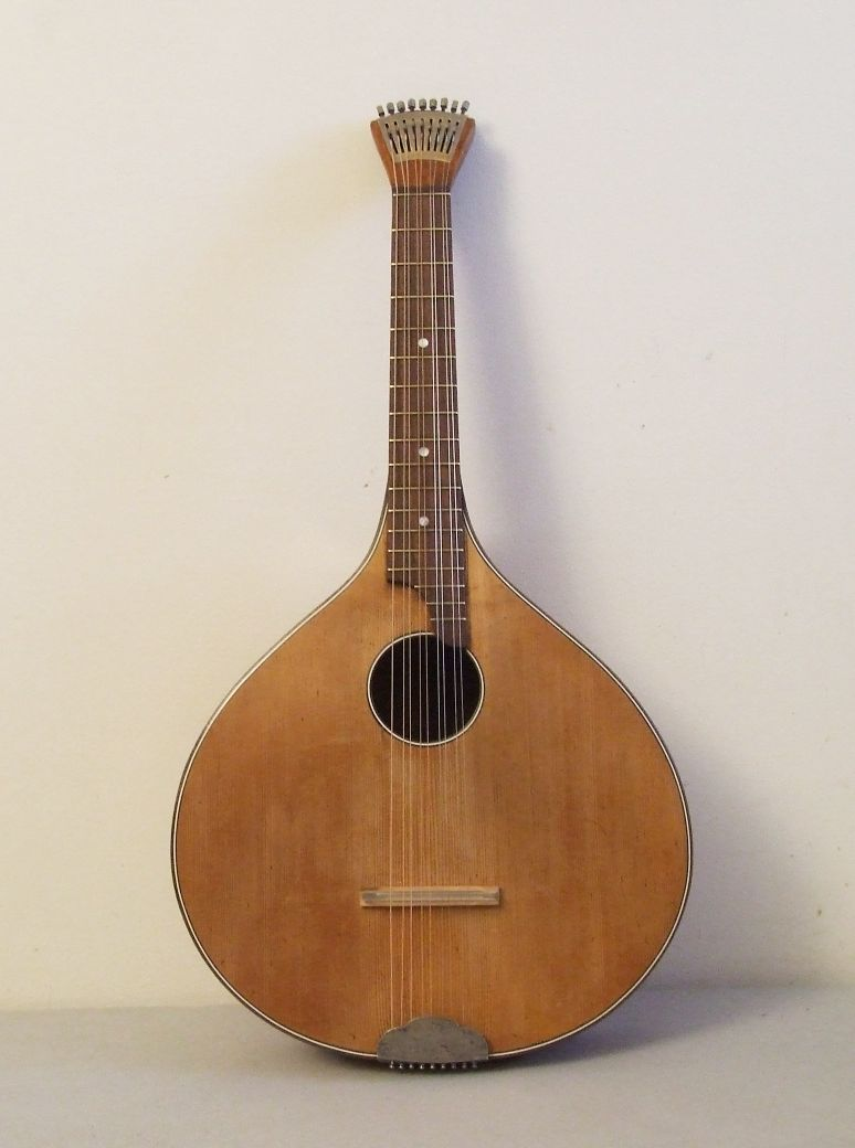 Vogtländische Waldzither, Hamburger Modell, um 1935. Foto von User:Neitram, Februar 2007.